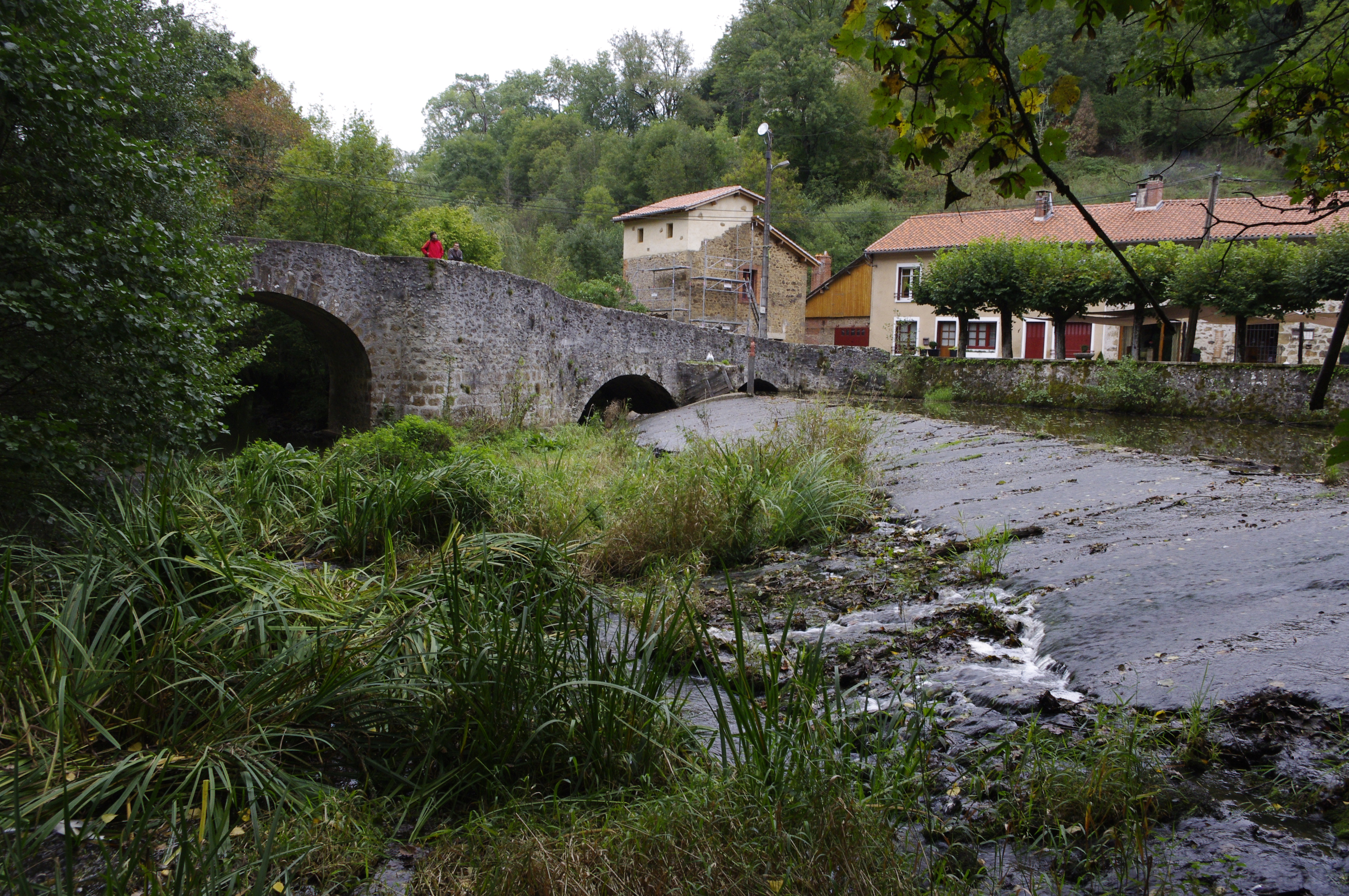 Pont gothique (XIIe siècle) sur la Graine àRochechouart.